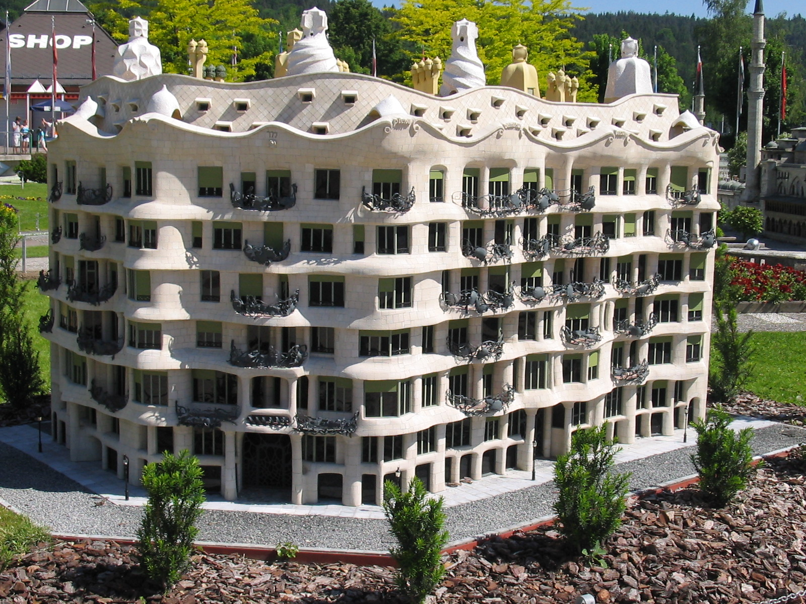 Casa Mila at Minimundus klagenfurt